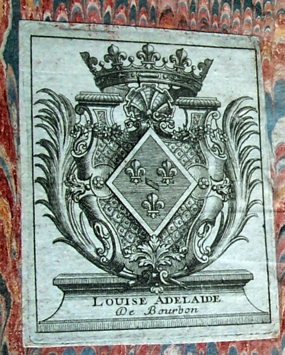 Ex-libris sur un livre de 1721 aux armes de S.A.S. Louise-Adélaïde de Bourbon (1696-1750), « Mademoiselle de la Roche-sur-Yon », princesse du sang de France